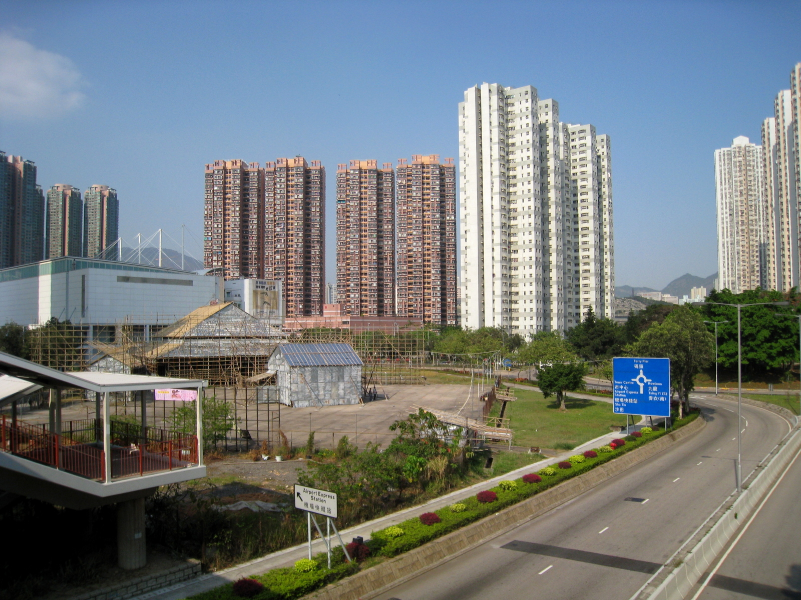 HK Tsing Yi Island